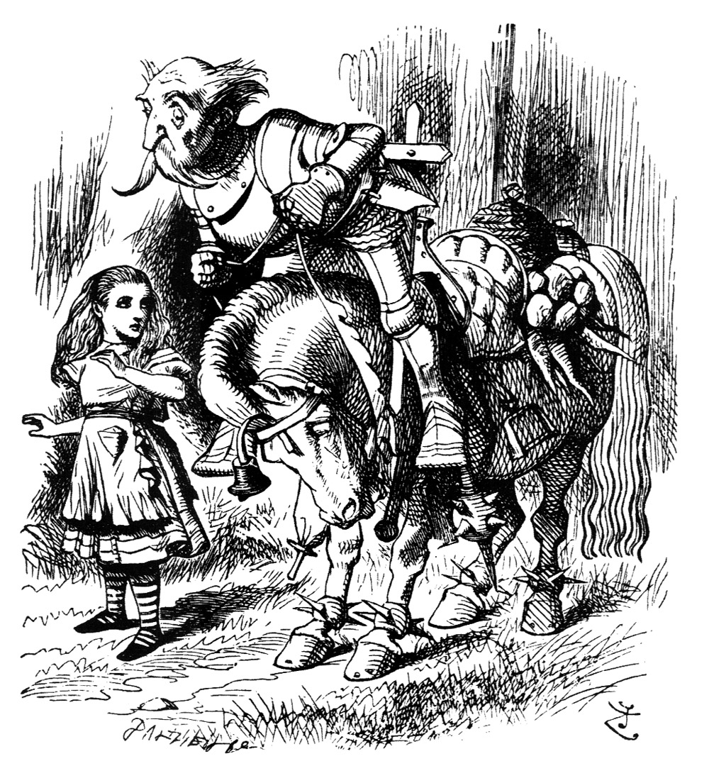 гравюра Джона Тенниела